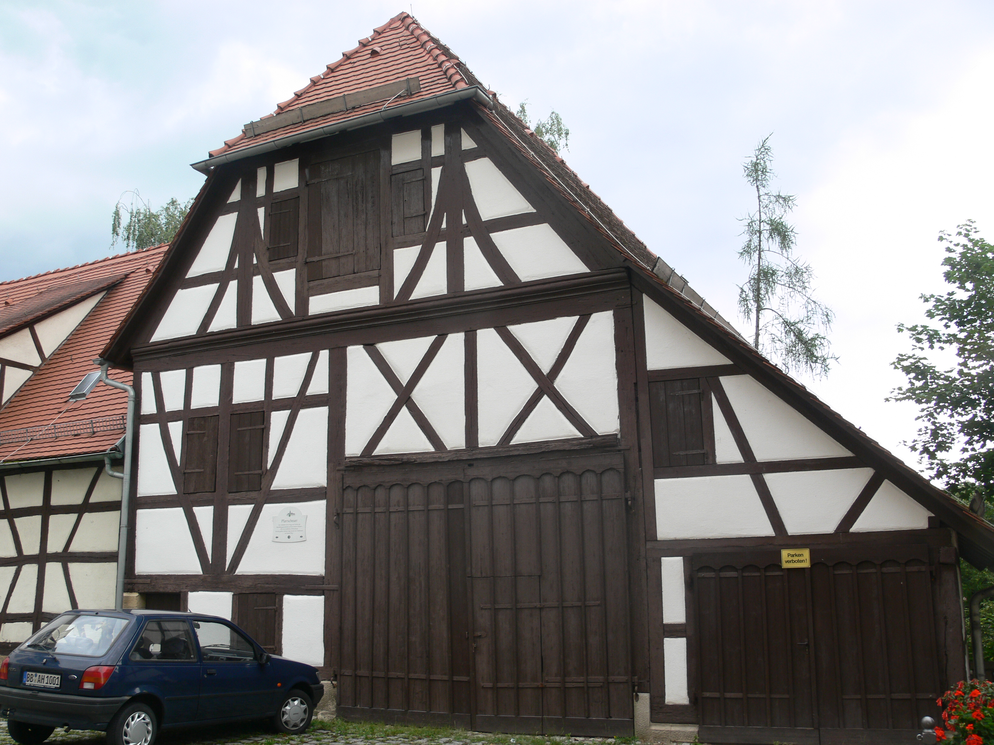 Pfarrscheuer Waldenbuch